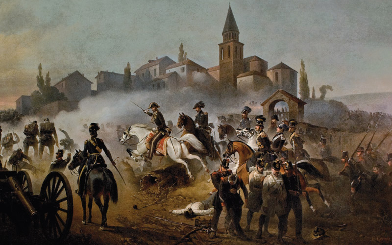 Secondo il Museo del Risorgimento di Torino, dove il quadro è esposto, l'opera si riferisce allo scontro di Sommacampagna avvenuto il 23 luglio 1848 subito prima della battaglia di Custoza, nell'ambito della prima guerra di indipendenza. Diversa interpretazione del soggetto del quadro la danno altri studiosi ( che, invece, collegano il dipinto ad un episodio secondario della prima guerra di indipendenza, avvenuto a Sommacampagna il 30 aprile 1848, in occasione della battaglia di Pastrengo (La mattina del 30 mentre iniziava l'attacco di Pastrengo e Bussolengo Radetzky cercò di fermare l'esercito piemontese lanciando 3000 croati su Sona e Sommacampagna, ma venne respinto dalla Brigata Aosta: a questo episodio specifico si riferisce il quadro del Cerruti Bauduc).